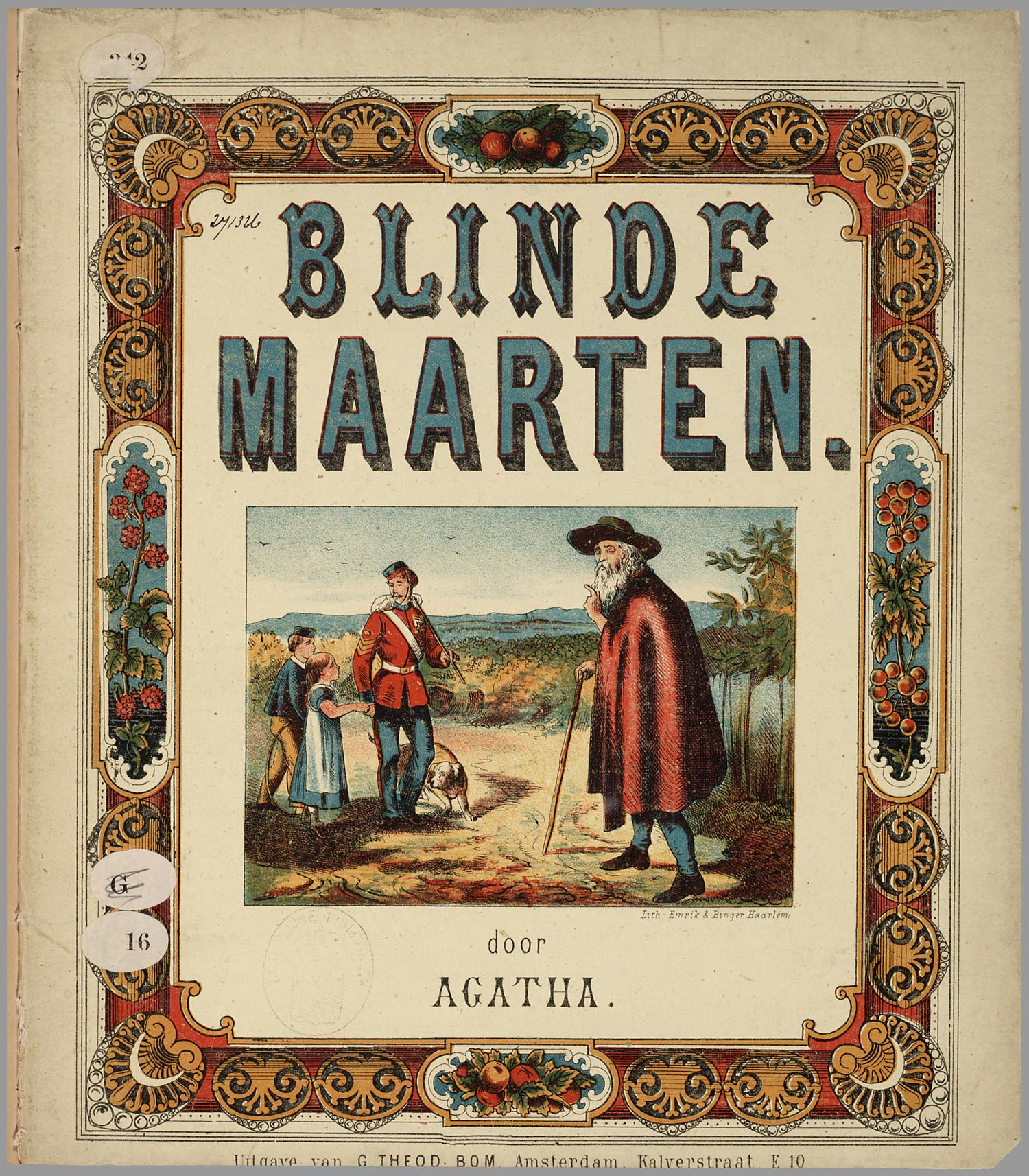 Prentenboek met op de voorkant een toy book-achtige gekleurde sierrand. Bevat 6 paginagrote kleurenlitho's, waarvan een dubbele. Twee kinderen logeren bij hun tante en ontmoeten een blinde man met een hond. Ze geven man en hond te eten, en horen verhalen over zijn leven. De zoon van de blinde man, een soldaat, komt zijn vader halen. 5 bl., 6 bl. pl : gekl. lith // De keerzijde der bladen is onbedrukt // Litho op de voorkant gedrukt door Emrik & Binger, Haarlem // Datering: niet in Brinkman, in Lust en Leering gedateerd op 1864 // Met fondslijstje op de achterkant Blinden // Prentenboeken